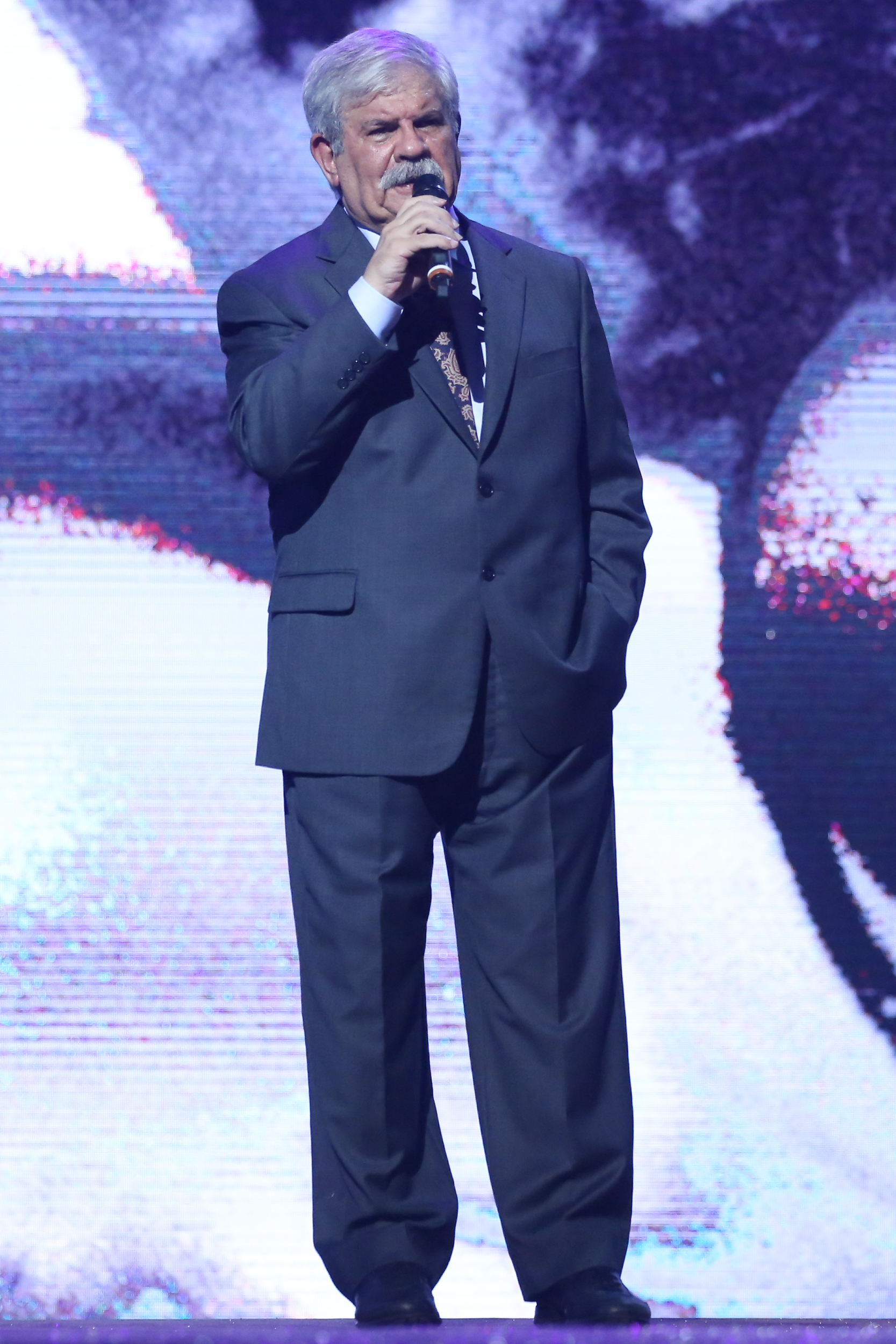 Dori Caymmi - 26° Prêmio da Música Brasileira 2015, no Theatro Municipal, no Centro do Rio de Janeiro/RJ. (10/06/15) Foto: Roberto Filho/Divulgacão